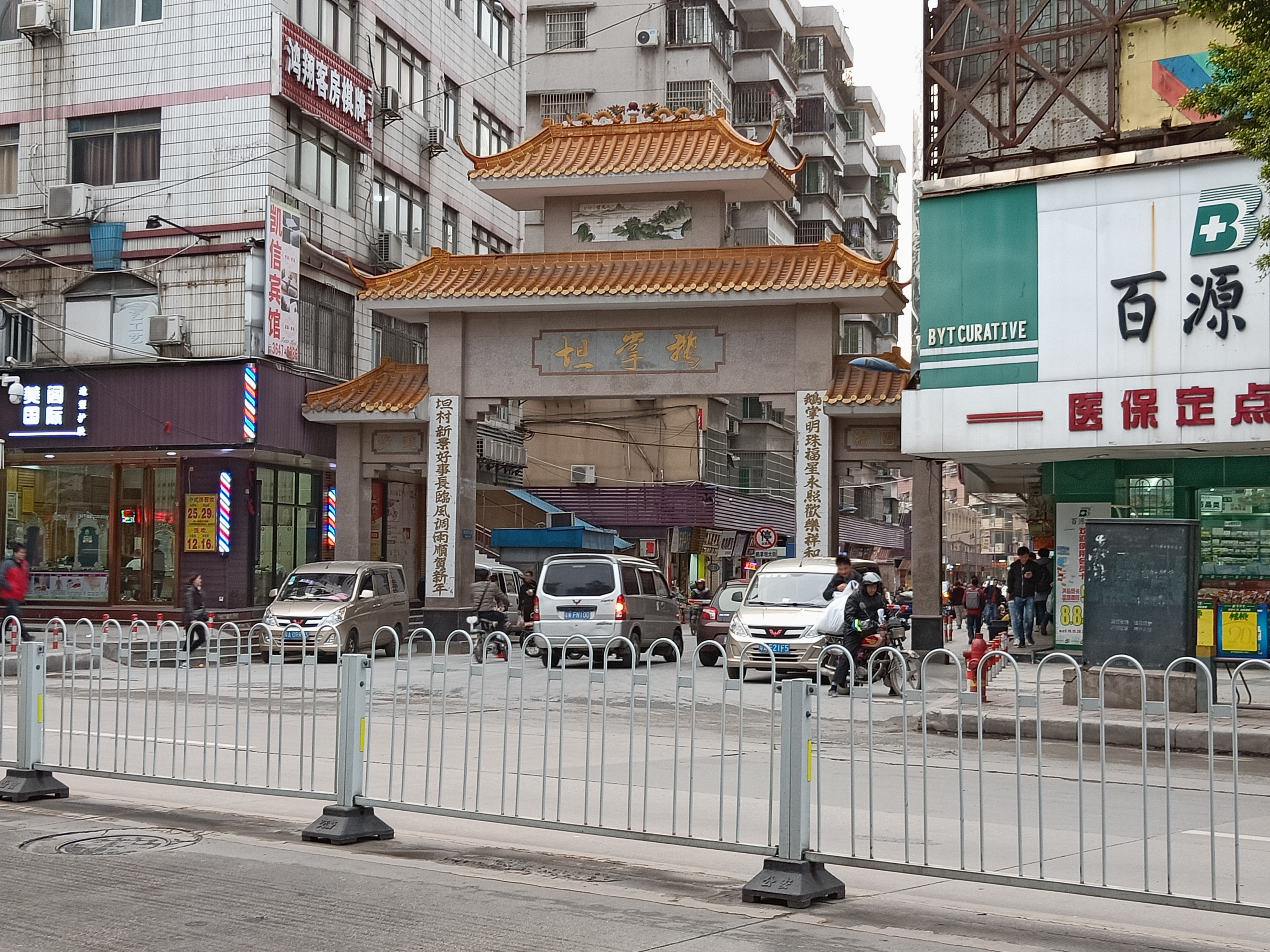 粵語: 喺中國廣東廣州白雲區鵝掌坦嘅牌坊（西槎路近同德圍一帶嗰邊）